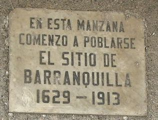 Placa informativa en la ciudad de Barranquilla.